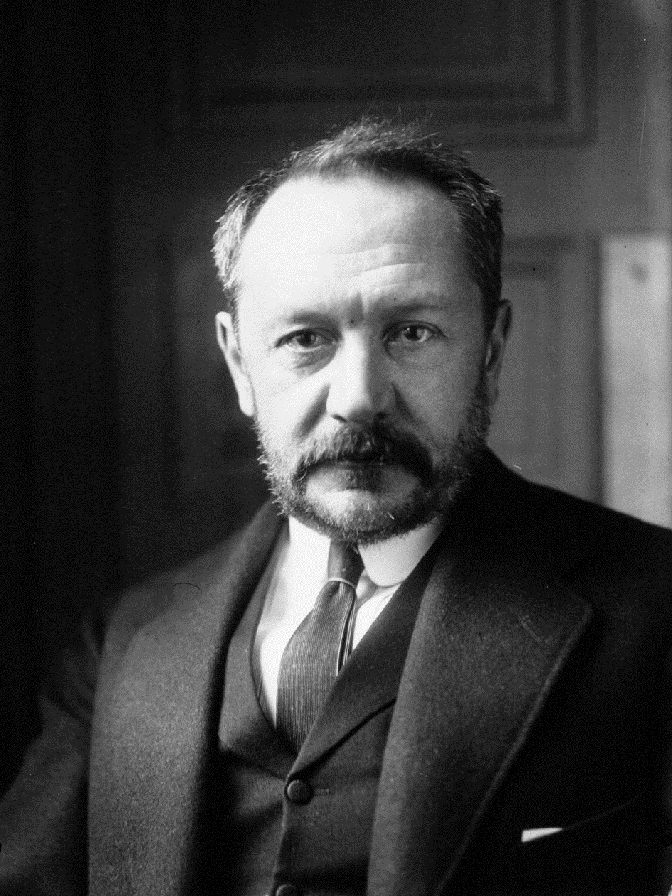 Vasily Maklakov, nouvel ambassadeur de Russie